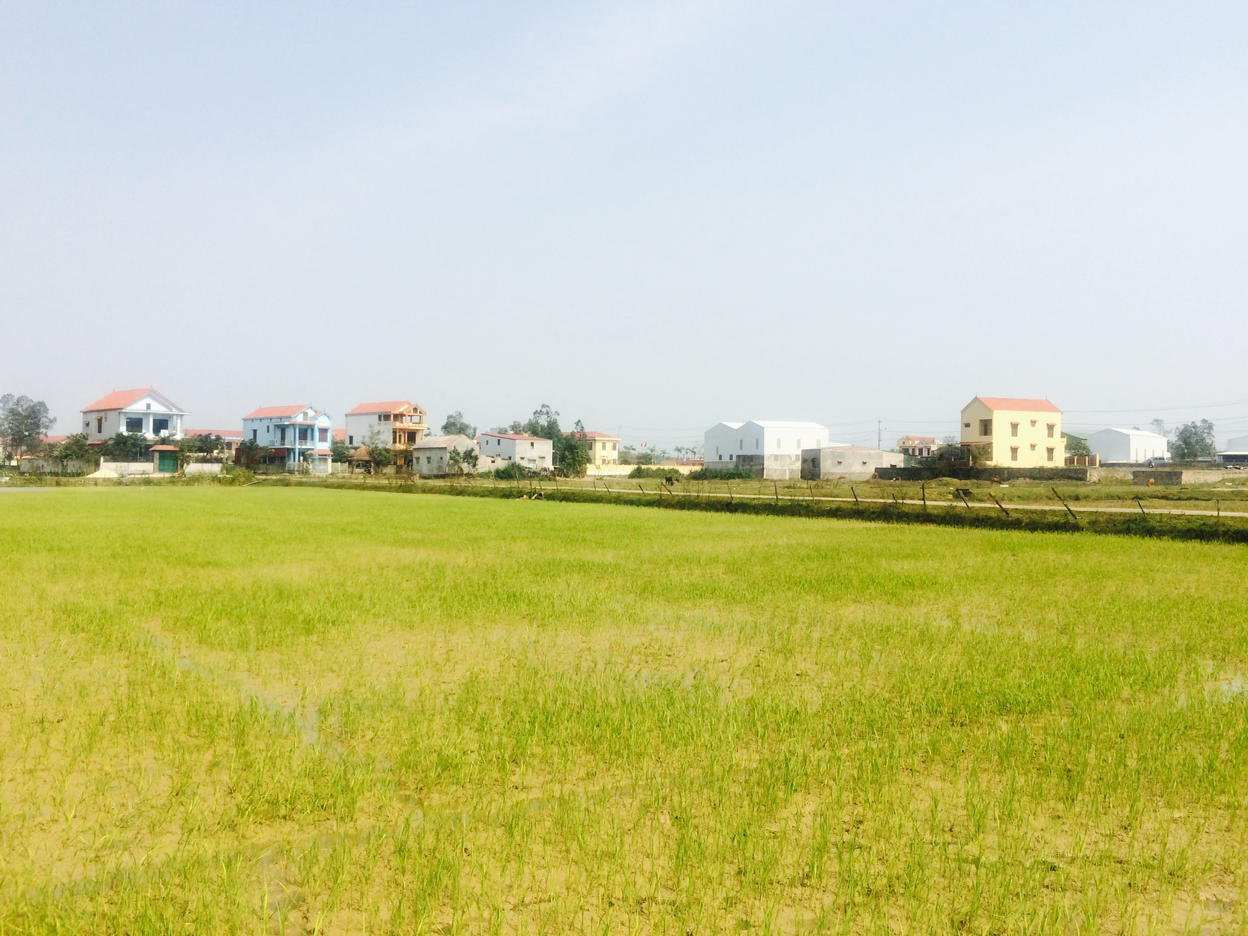 Ảnh chụp một cánh đồng tại khu vực Thị trấn Quán Hàu, Quảng Ninh, Quảng Bình